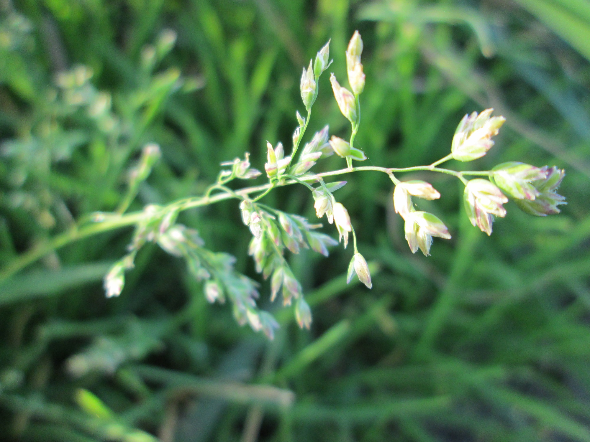 Einjähriges Rispengras (Poa annua) bei Hockenheim